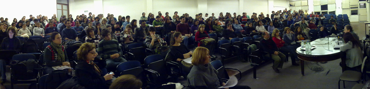 Jornada de Flor de Ceibo en la Facultad de Psicología de la UDELAR.